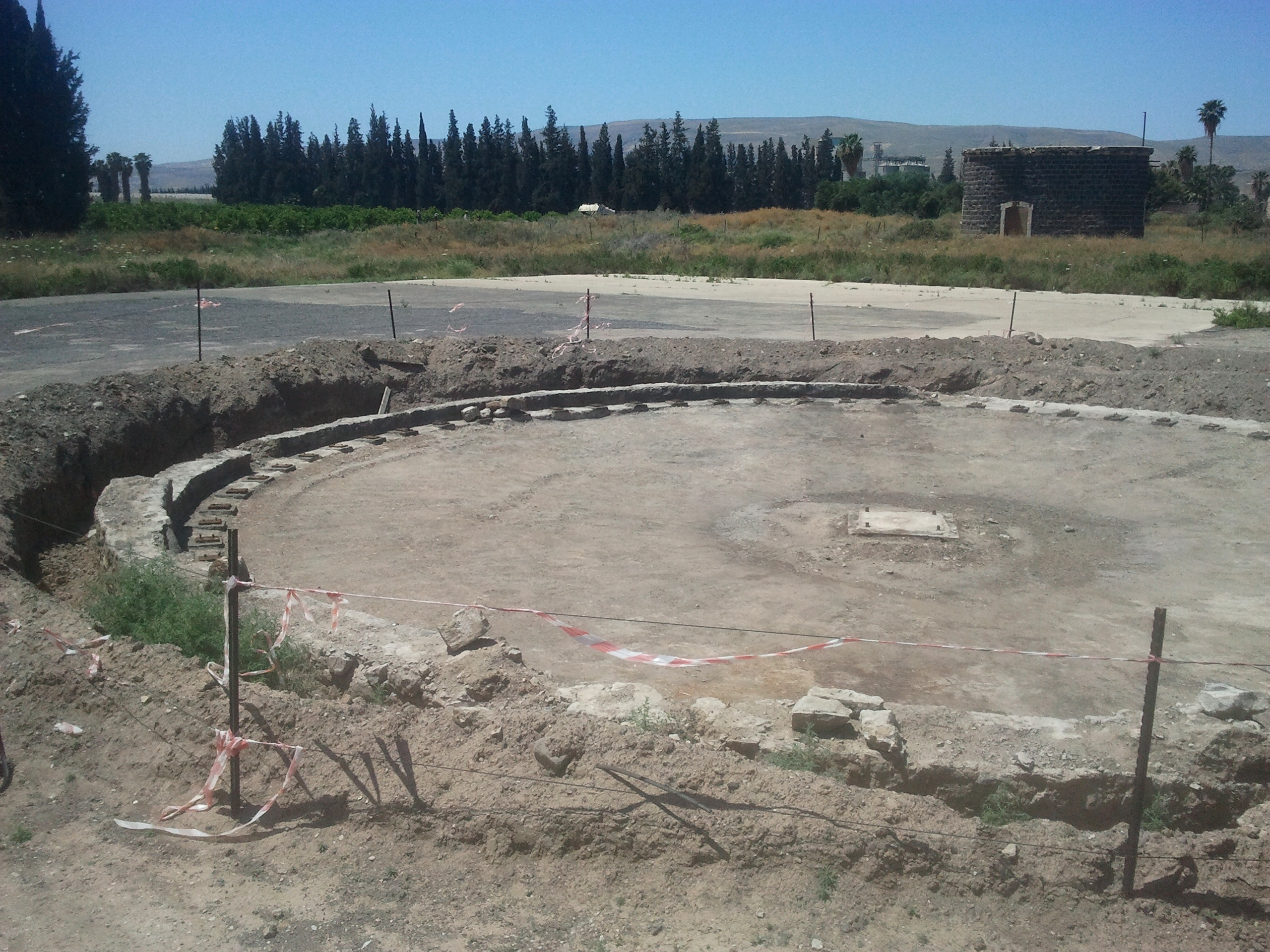 מסובב הקטרים של תחנת הרכבת בצמח. המסובב נמצא על ידי הודה לבנוני בינואר 2014 ממזרח לתחנת הרכבת ליד מגדל המים